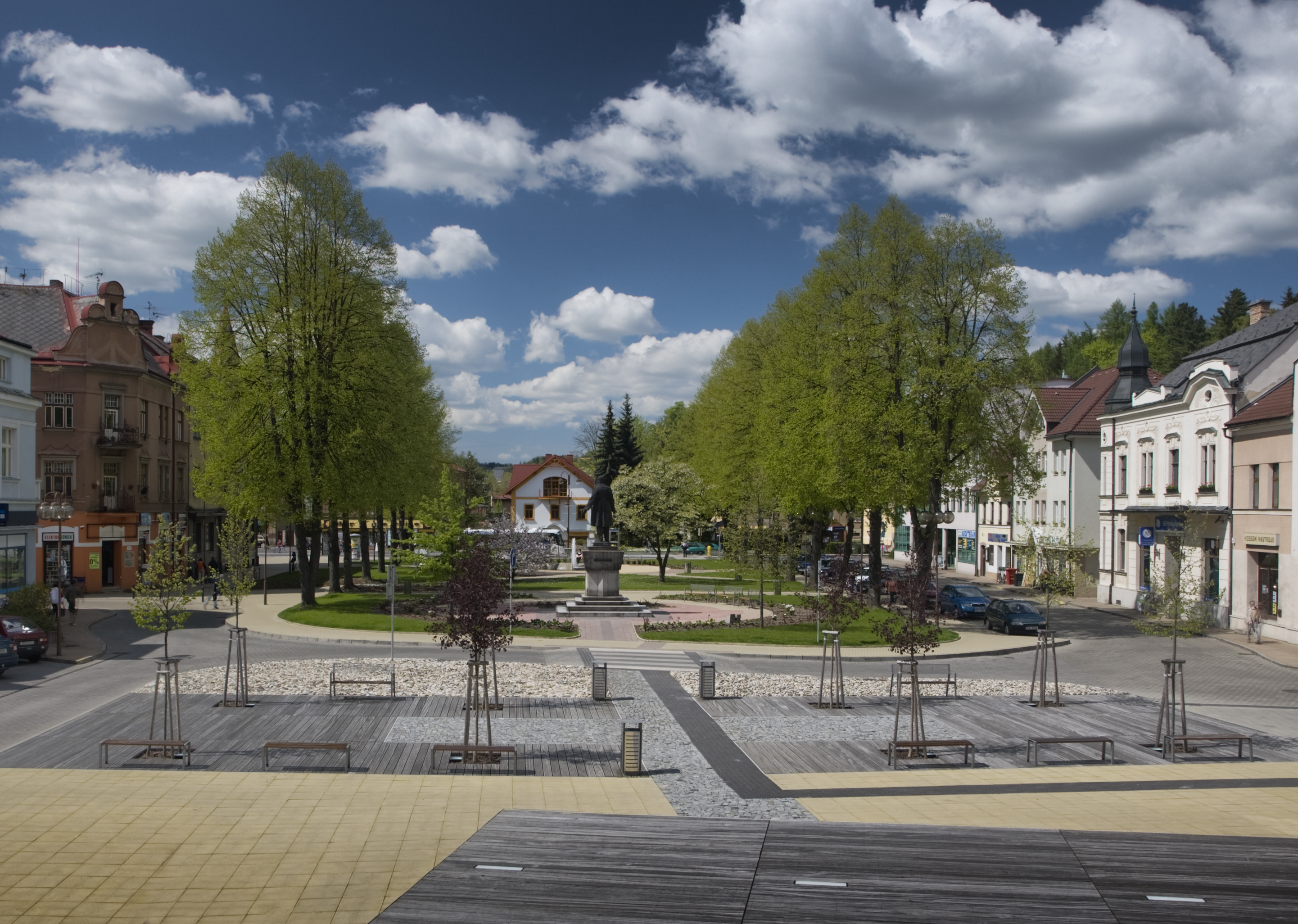 pohled na Riegrovo náměstí